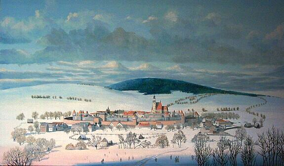 Předpokládaná podoba Prachatic v 16.století,pohled od jihu,olej na plátně 143x85cm